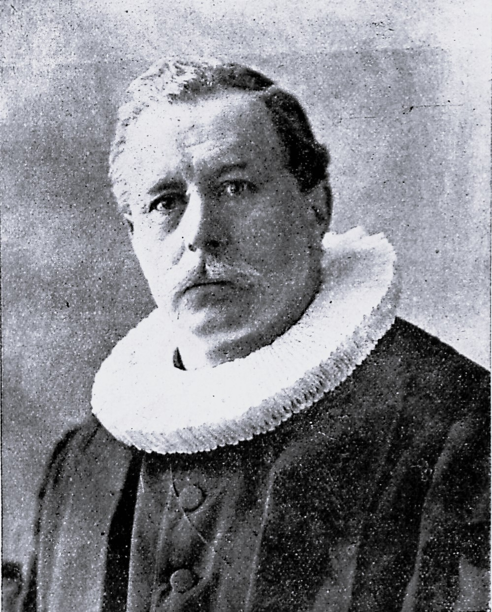 Senior Hauptpastor Johannes Evers.